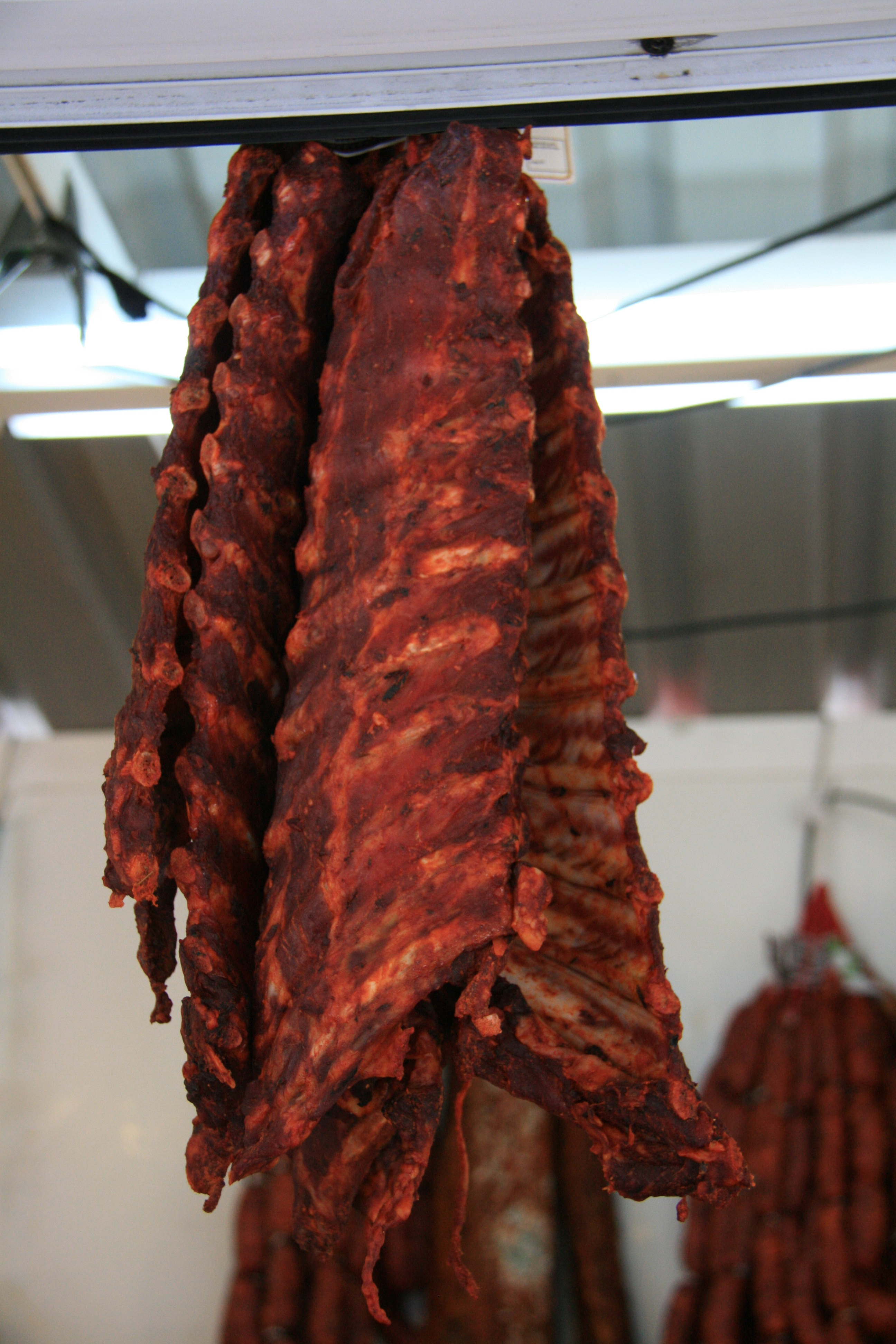 Costillas